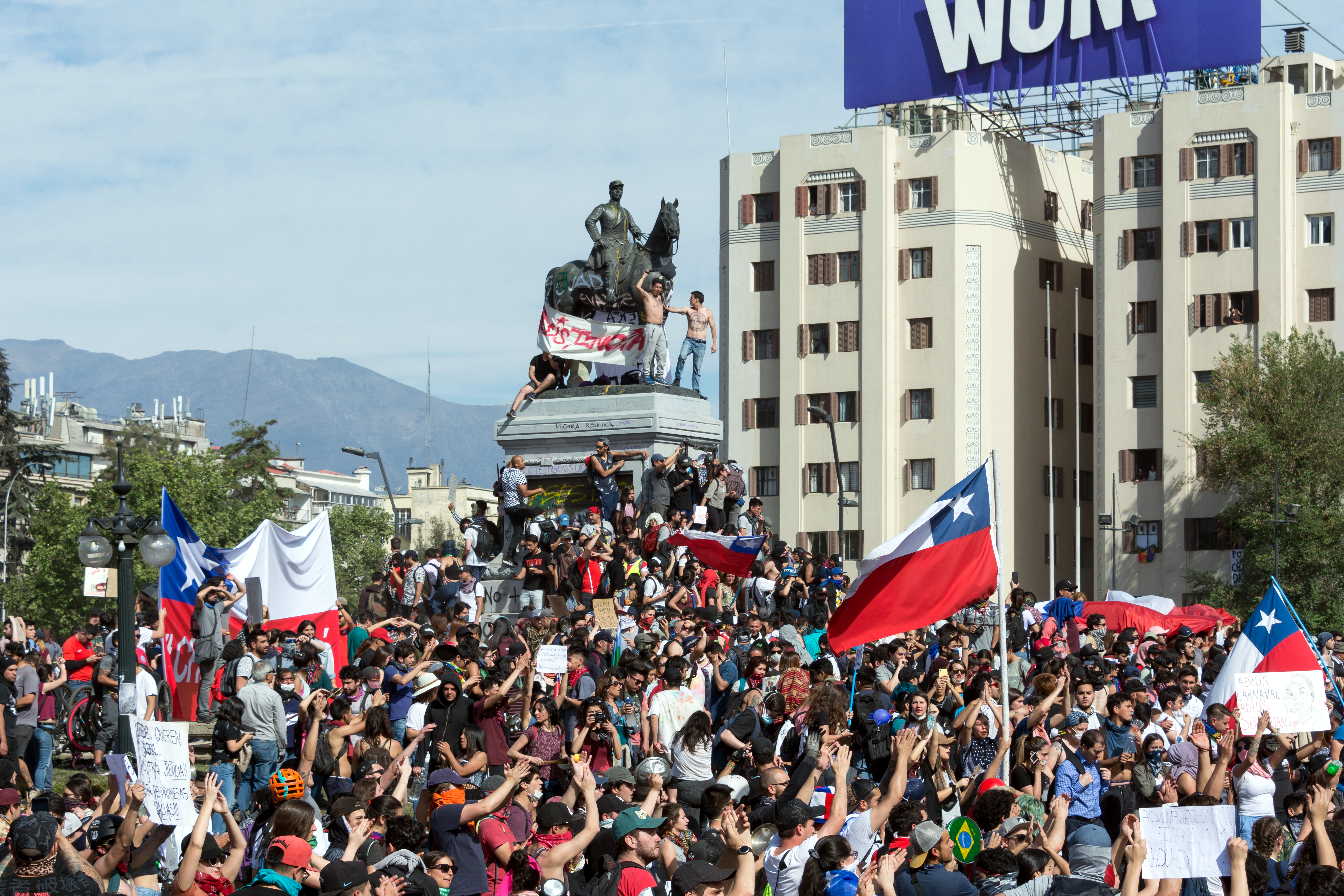 Protestas en Chile de 2019, Plaza Baquedano, Santiago, Chile